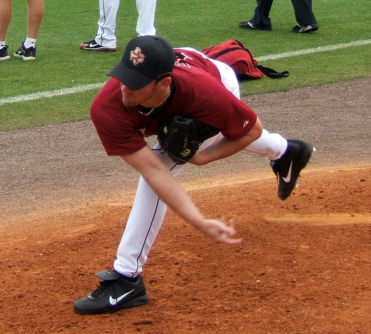 Roy Oswalt